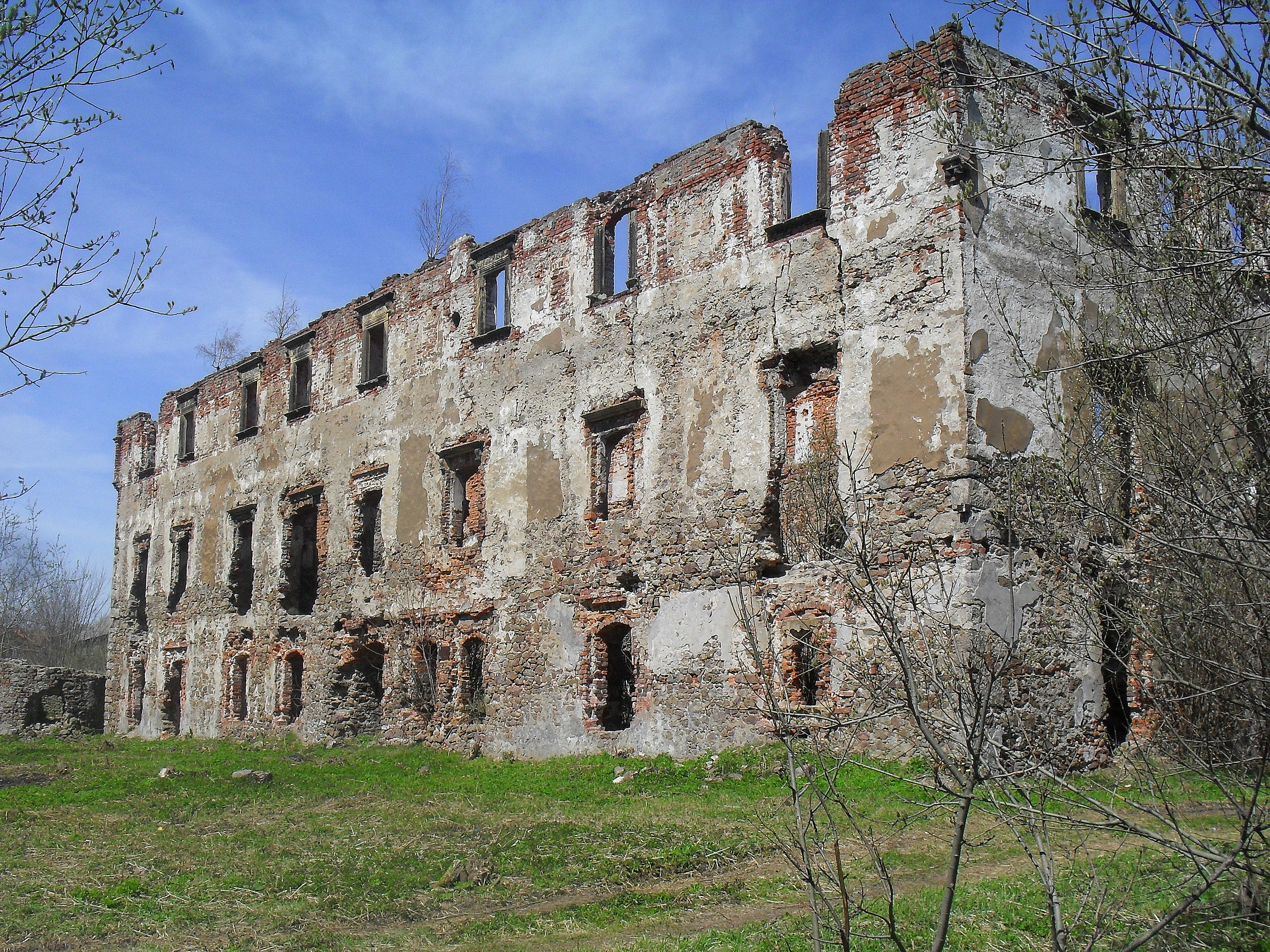 Kamienna Góra, ruiny zamku